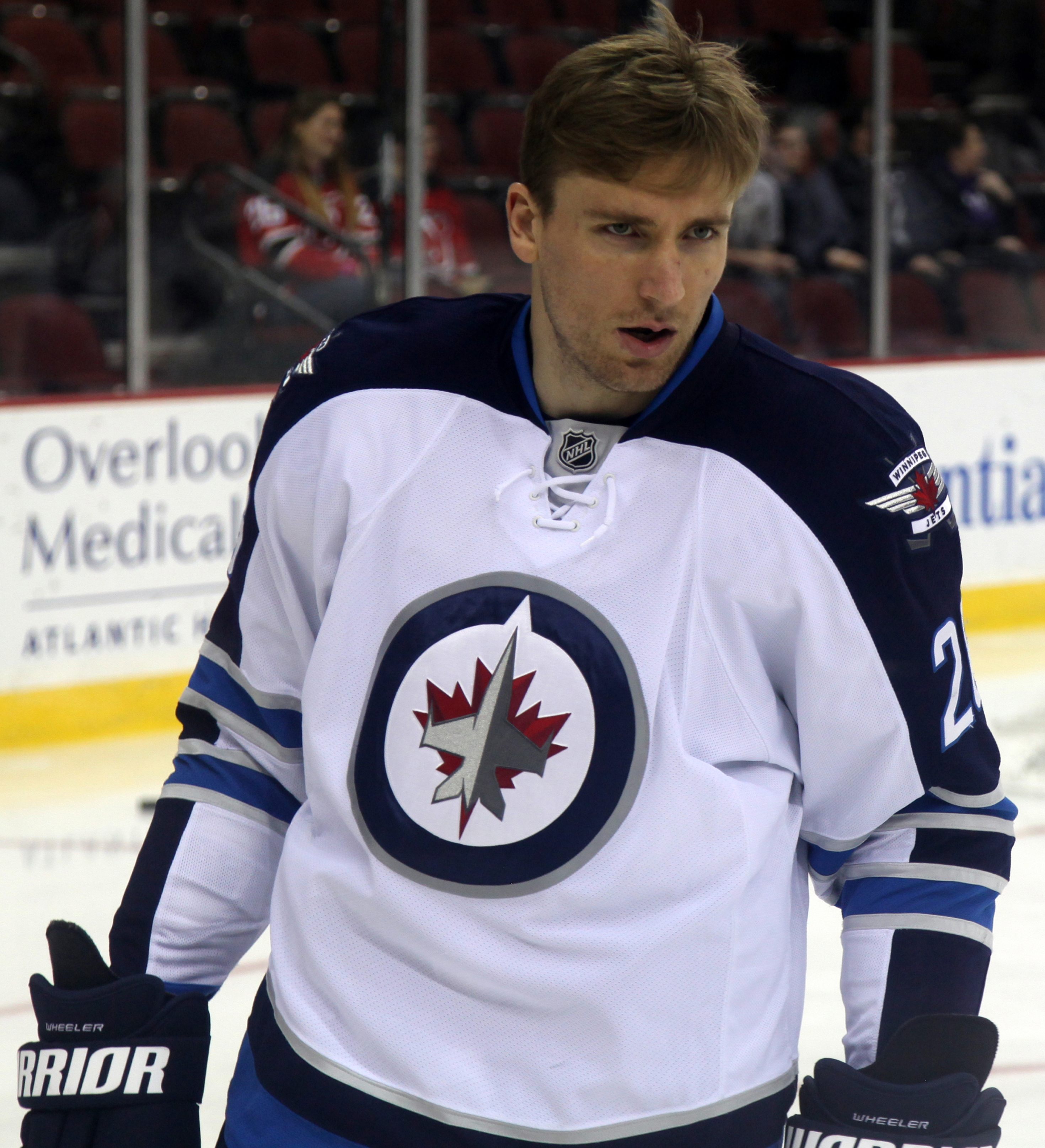 Blake Wheeler during warmups in 2013.